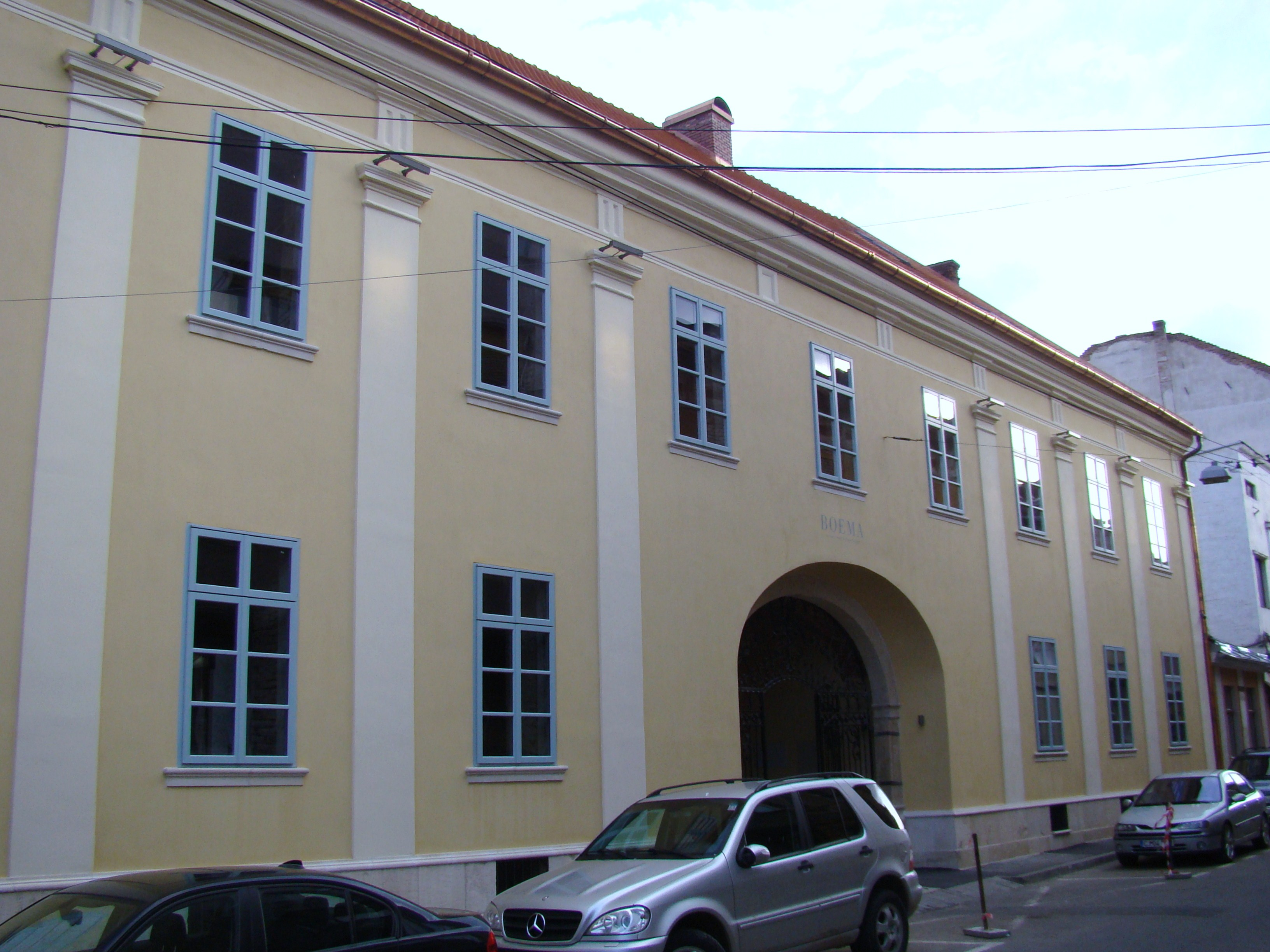 Casă monument istoric, str.Iuliu Maniu nr.34, în prezent Restaurant „Boema”